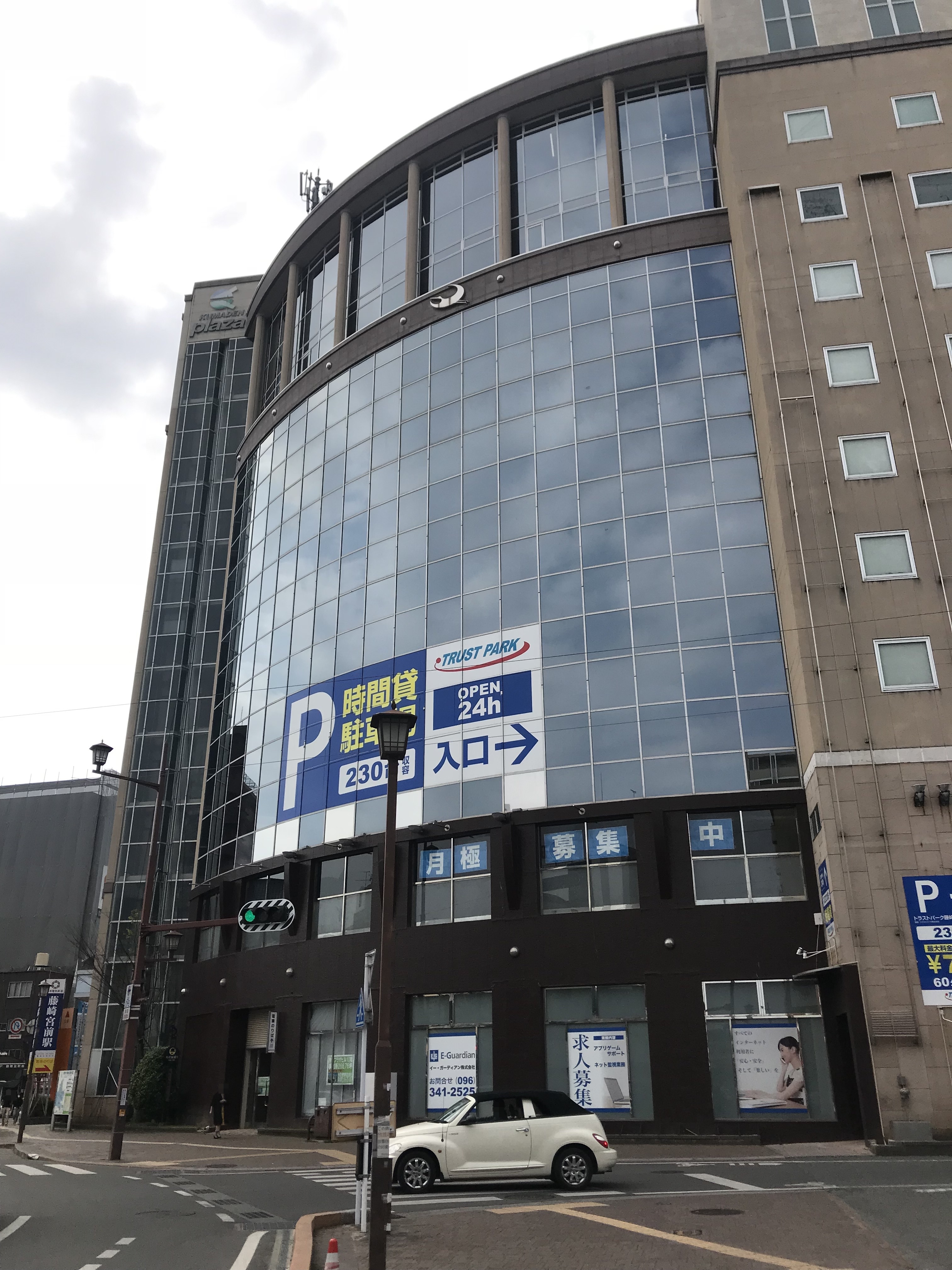 藤崎宮前駅の駅ビル